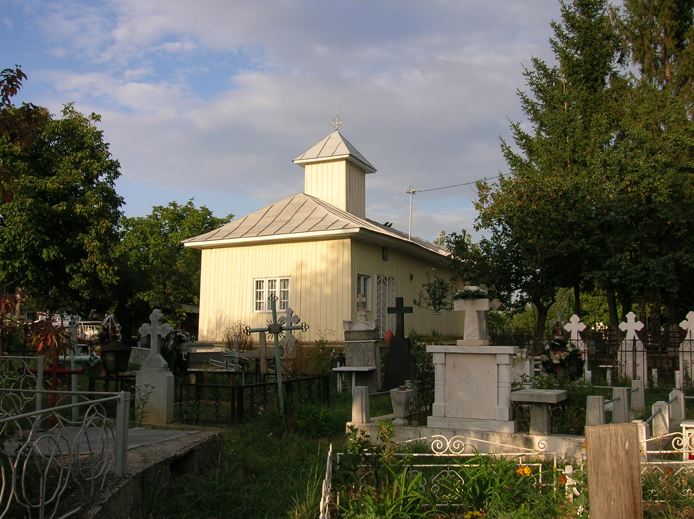 Comuna Valea Seacă Bacău - Satul Cucova - Biserica Adormirea Maicii Domnului - Paraclisul